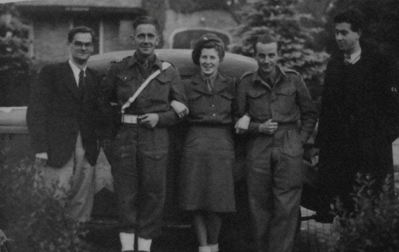 Foto genomen tussen 1941-1945